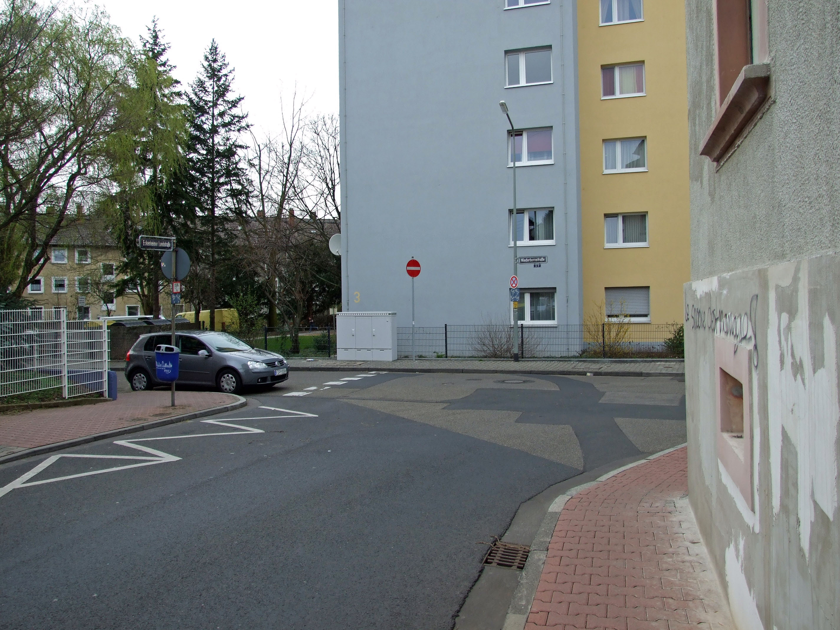 Bei Nr. 503 endet die Eckenheimer Landstrasse als Einbahnstrasse mit der Einmündung in die von links kommende (Einbahnstr.) Niederbornstrasse in Ffm-Eckenheim